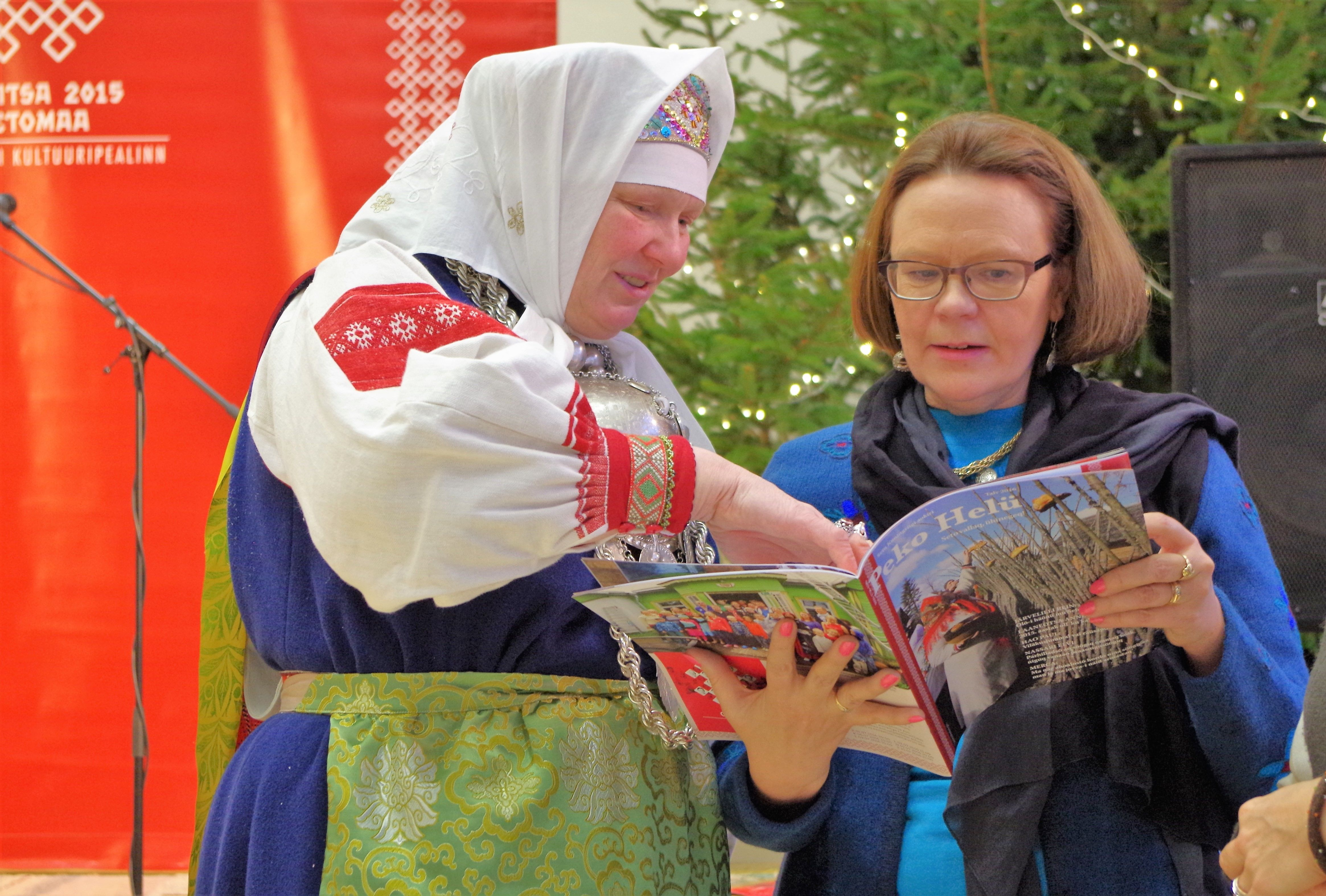 Kauksi Ülle ja Kristi Narinen värsket Peko Helü sirvimas